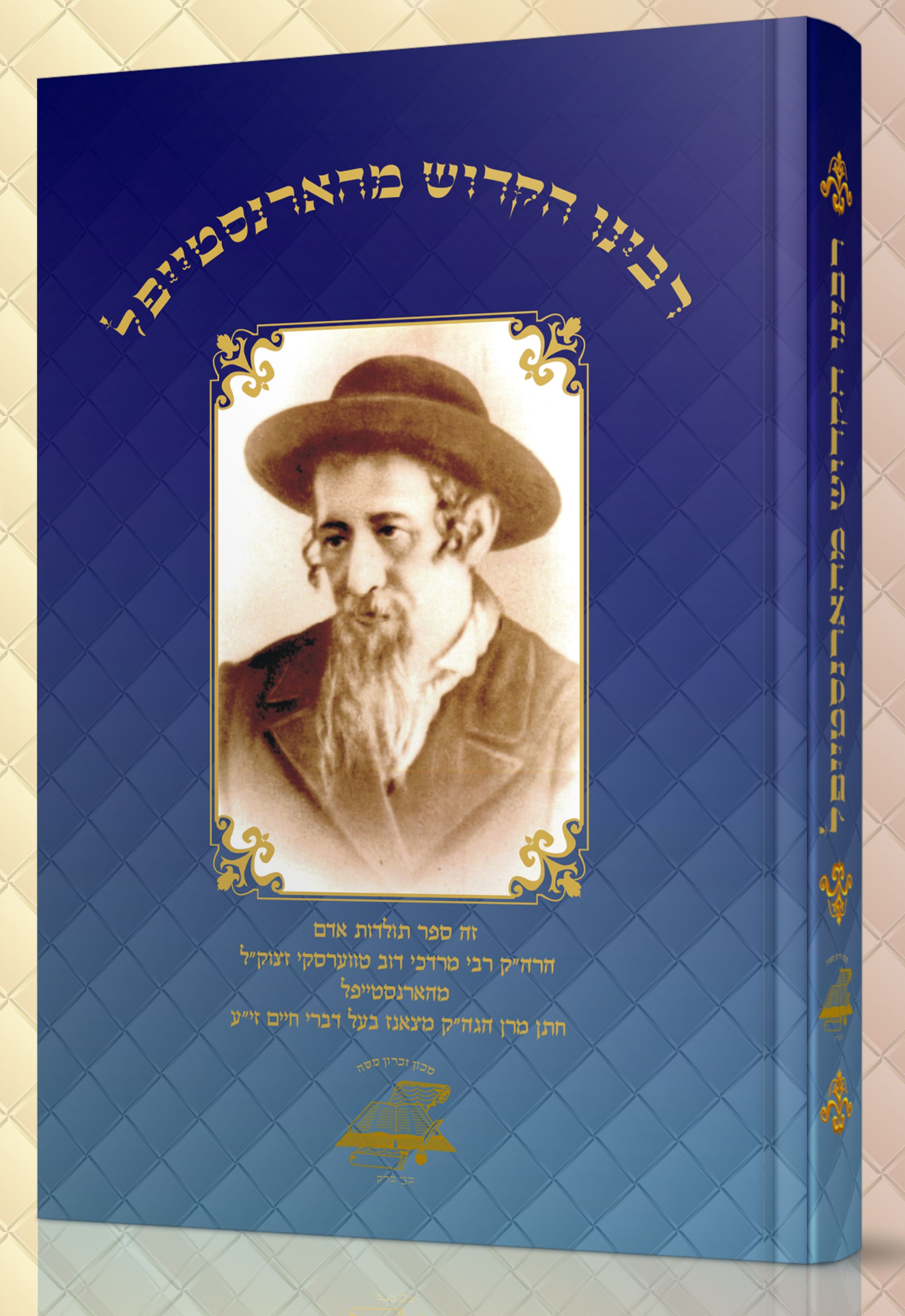 כריכת הספר "רבינו הקדוש מהארנסטייפל"